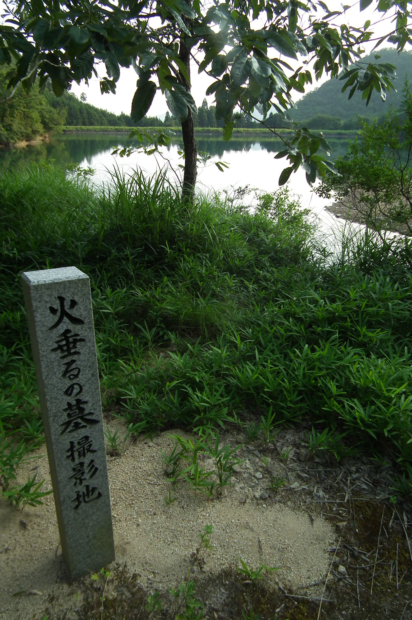 Akitani Pond Grave of the Fireflies 秋谷池（兵庫県西脇市黒田庄町喜多字秋谷口） 『火垂るの墓』実写映画版 ロケ地